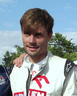 Jakub Przygoński.